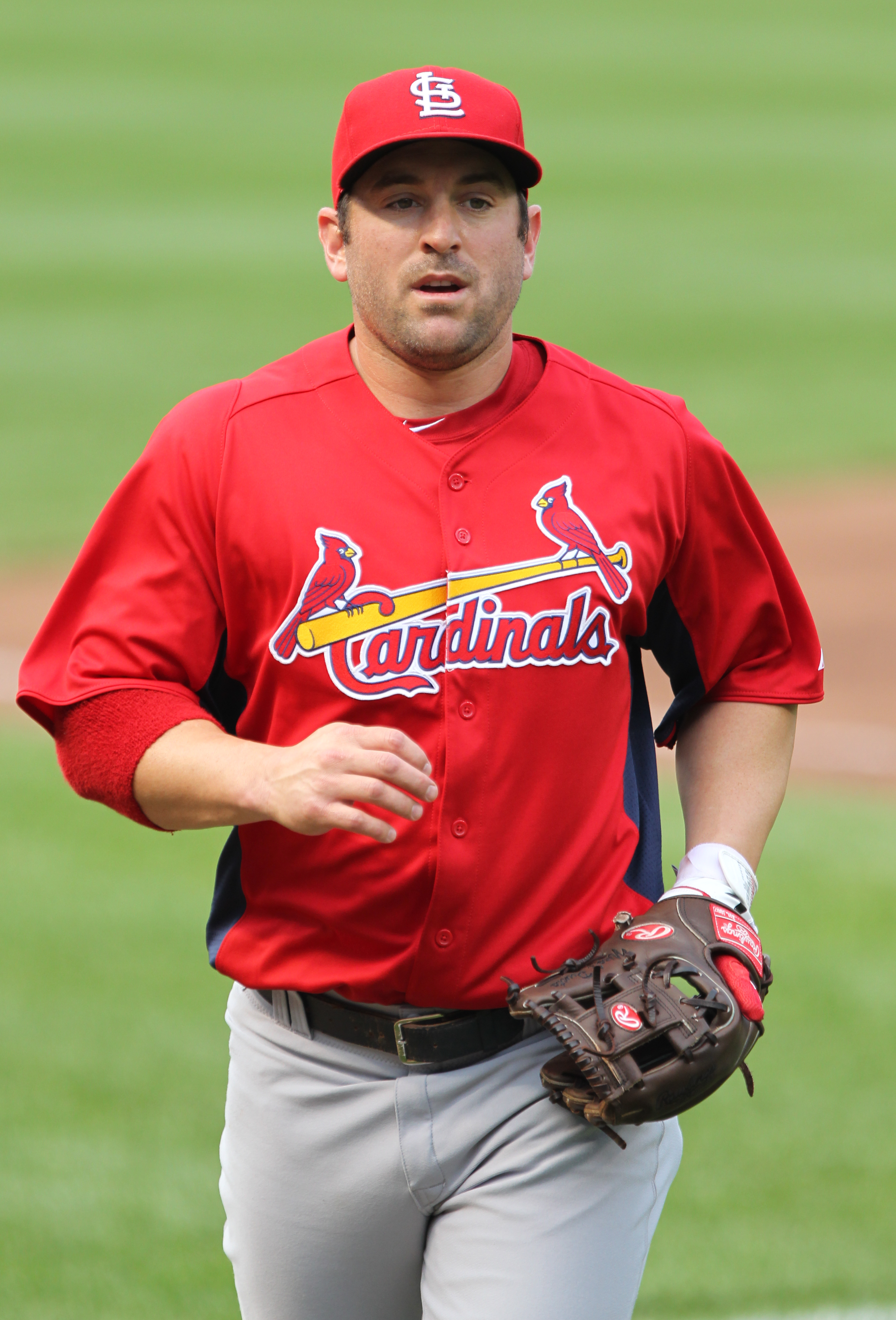 Nick Punto